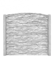 Ukázka betonového plotu - betonové desky a 2 sloupky